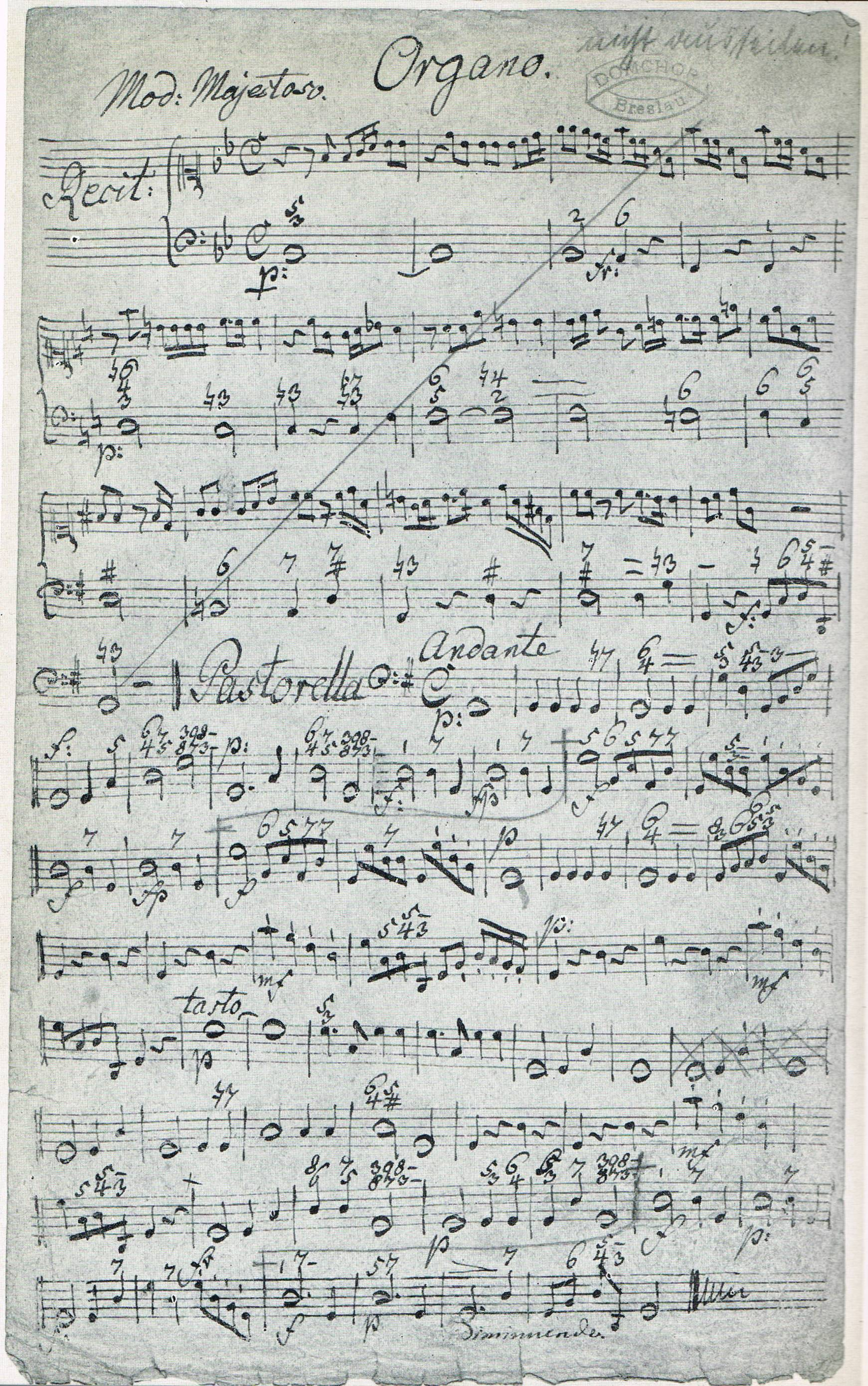 Transeamus. Organo.